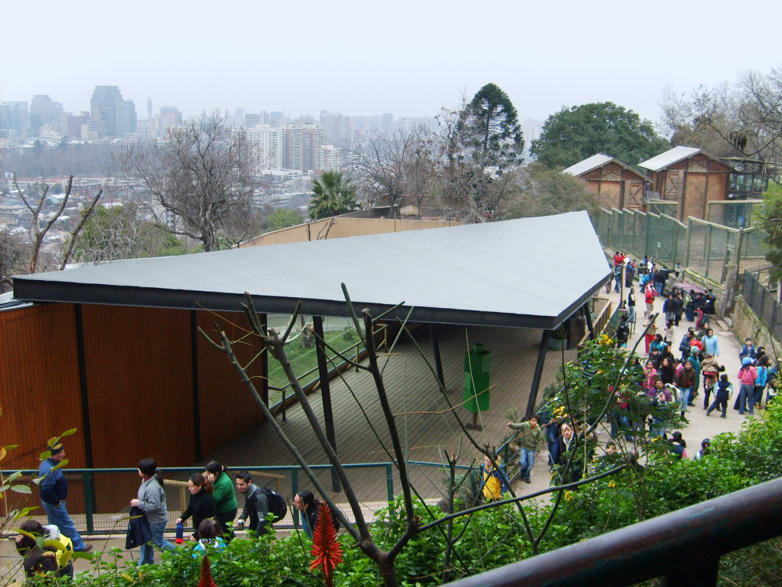 Interior del Zoológico Nacional de Chile, en Santiago.